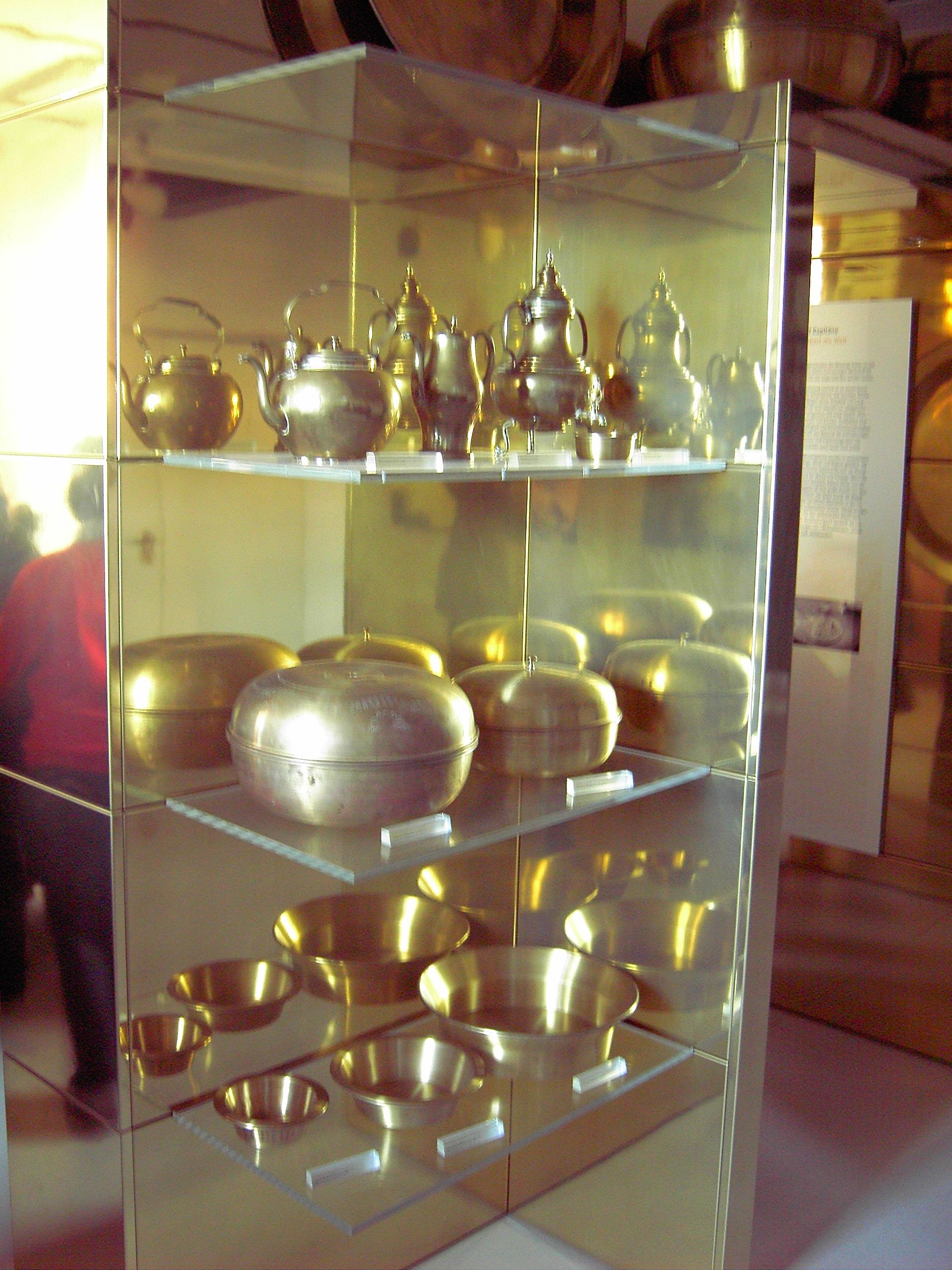 Bilder aus dem Museum Zinkhütter Hof in Stolberg/Rhld.